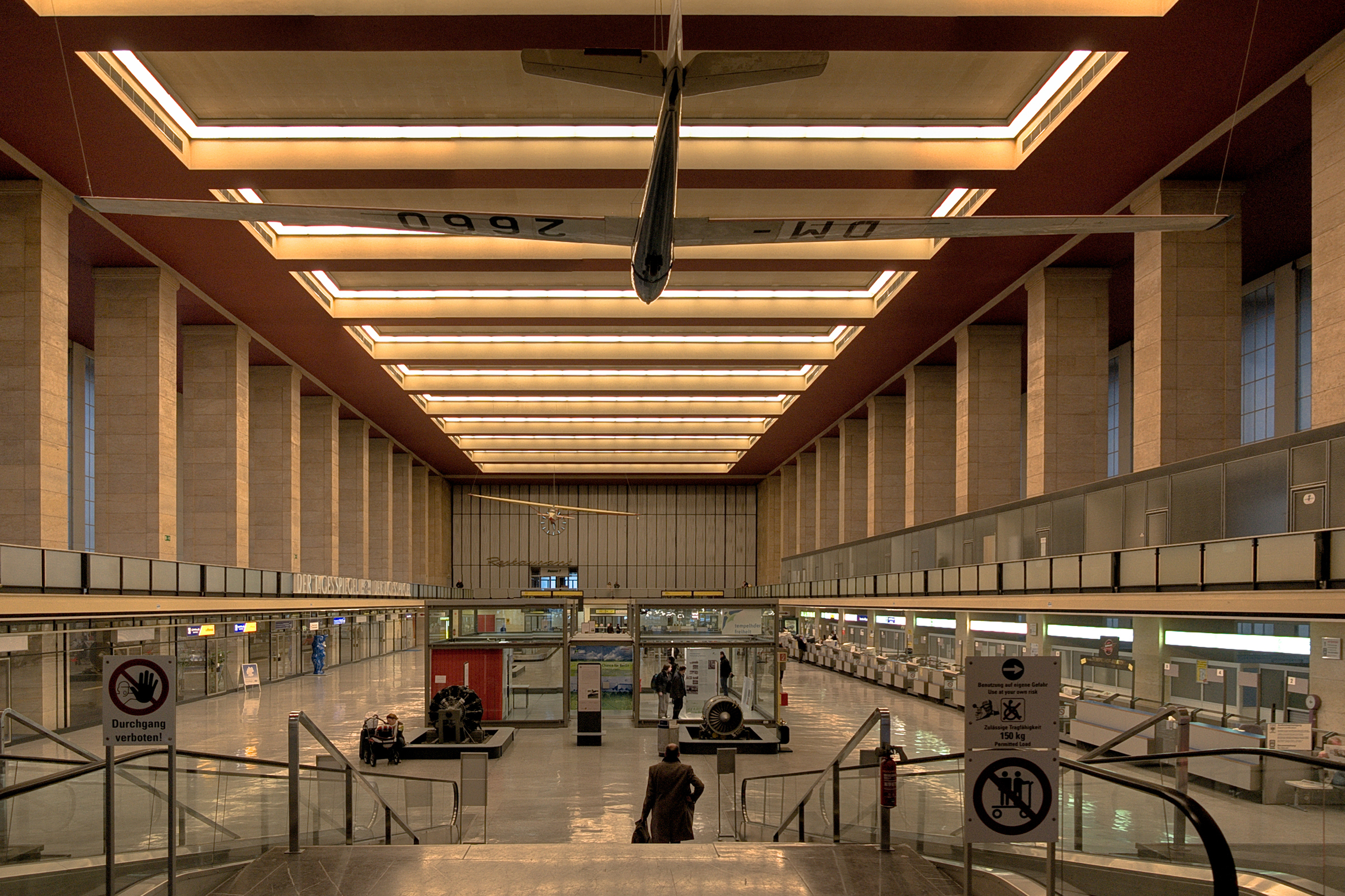 Flughafen Tempelhof Abfertigungshalle Terminal B